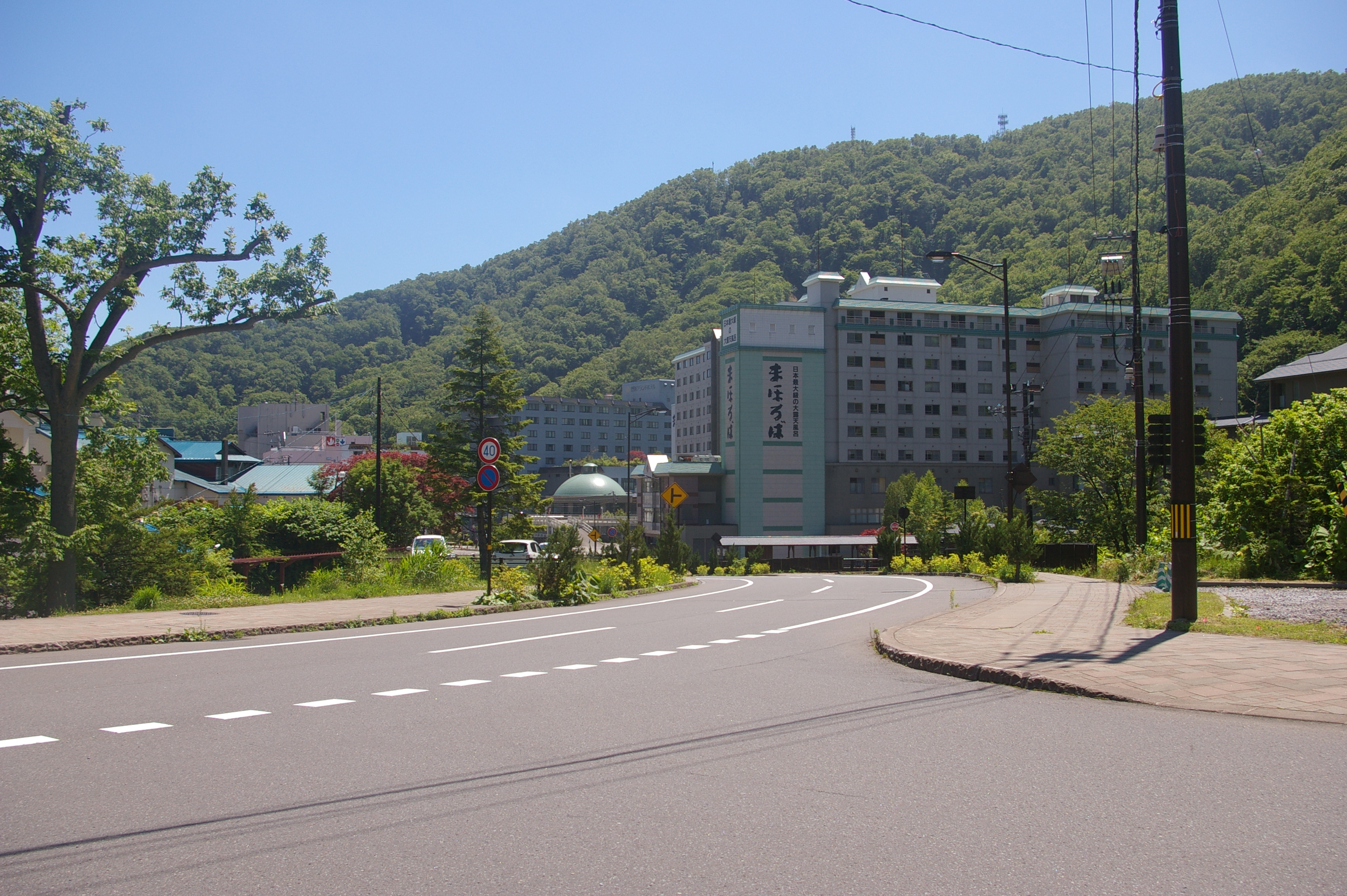 ホテルまほろば